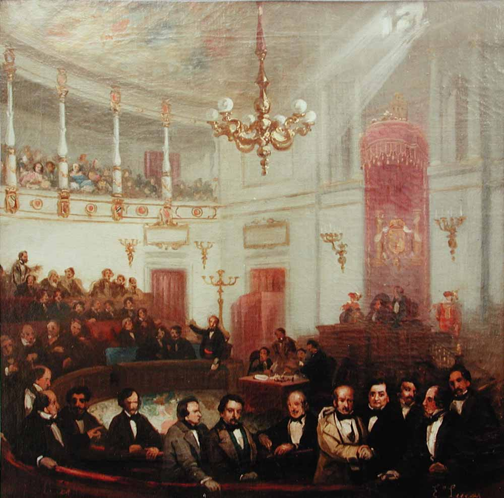 El lienzo representa el desarrollo de un acto parlamentario en el Salón de Sesiones del Congreso de los Diputados de España a mediados del siglo XIX.